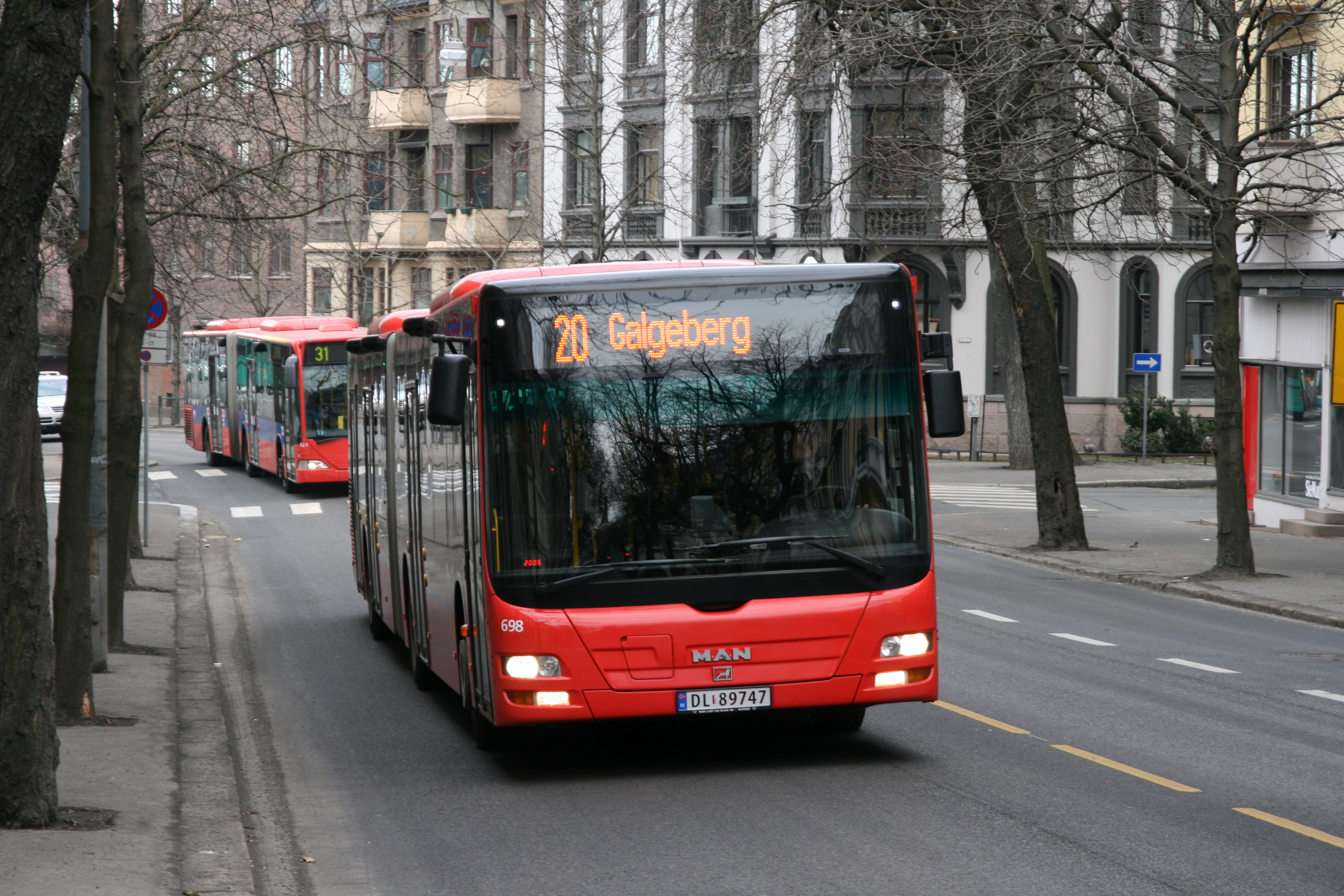 20-bussen til Galgeberg. Like bak kommer 31-bussen til Grorud. Bildet er tatt i Bygdøy allé på Frogner i Oslo.